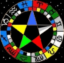 Etoile des Couleurs du Zodiaque des Décans de Ptolémée (date de création : 28/01/07, crée par Alexandre N.Isis)